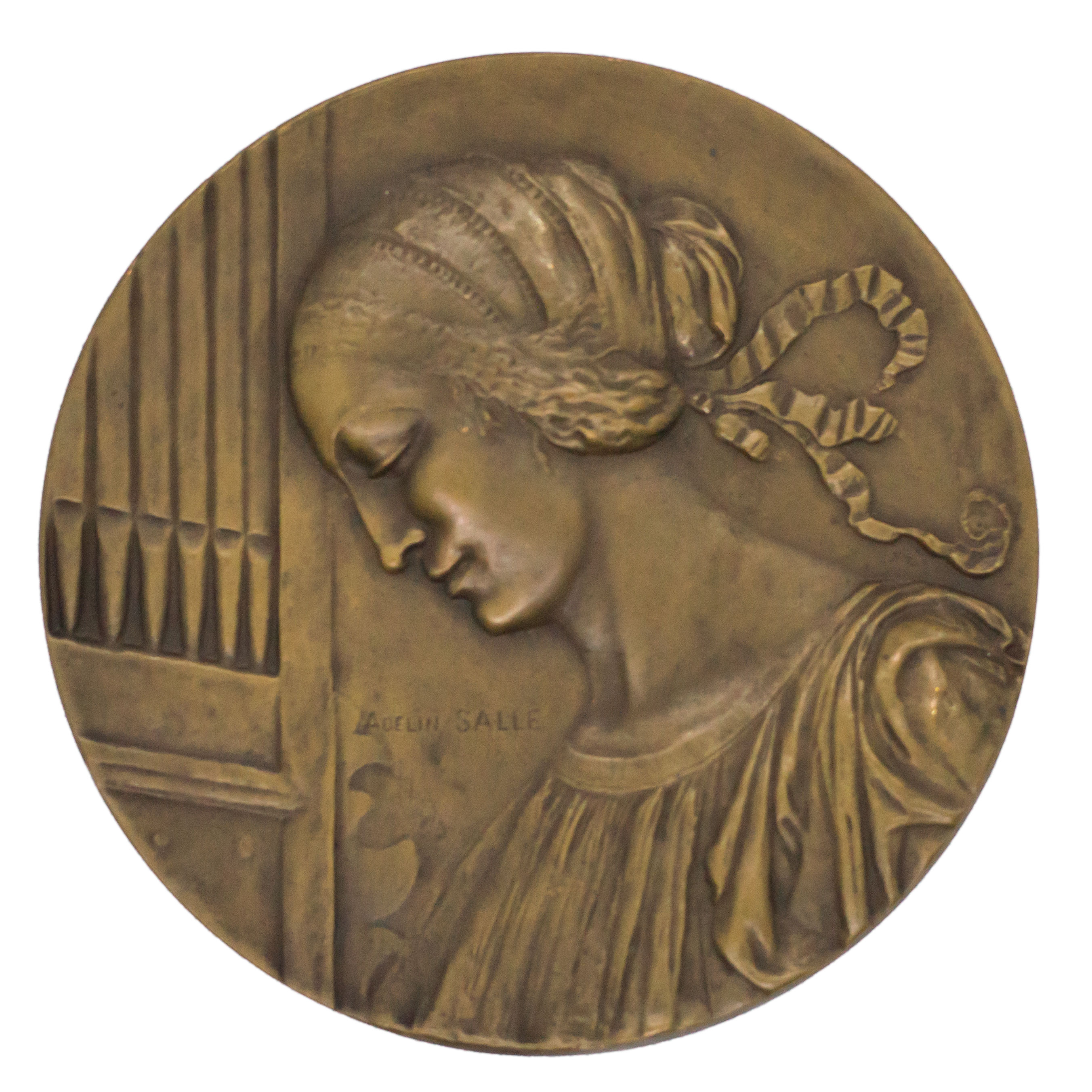 Médaille en bronze Adelin SALLE en bronze représentant un buste de femme de profil avec des tuyaux d'orgue à l'occasion du Concours international de chant d'ensemble Liège 1930 This photo of movable heritage has been taken in the Walloon Region